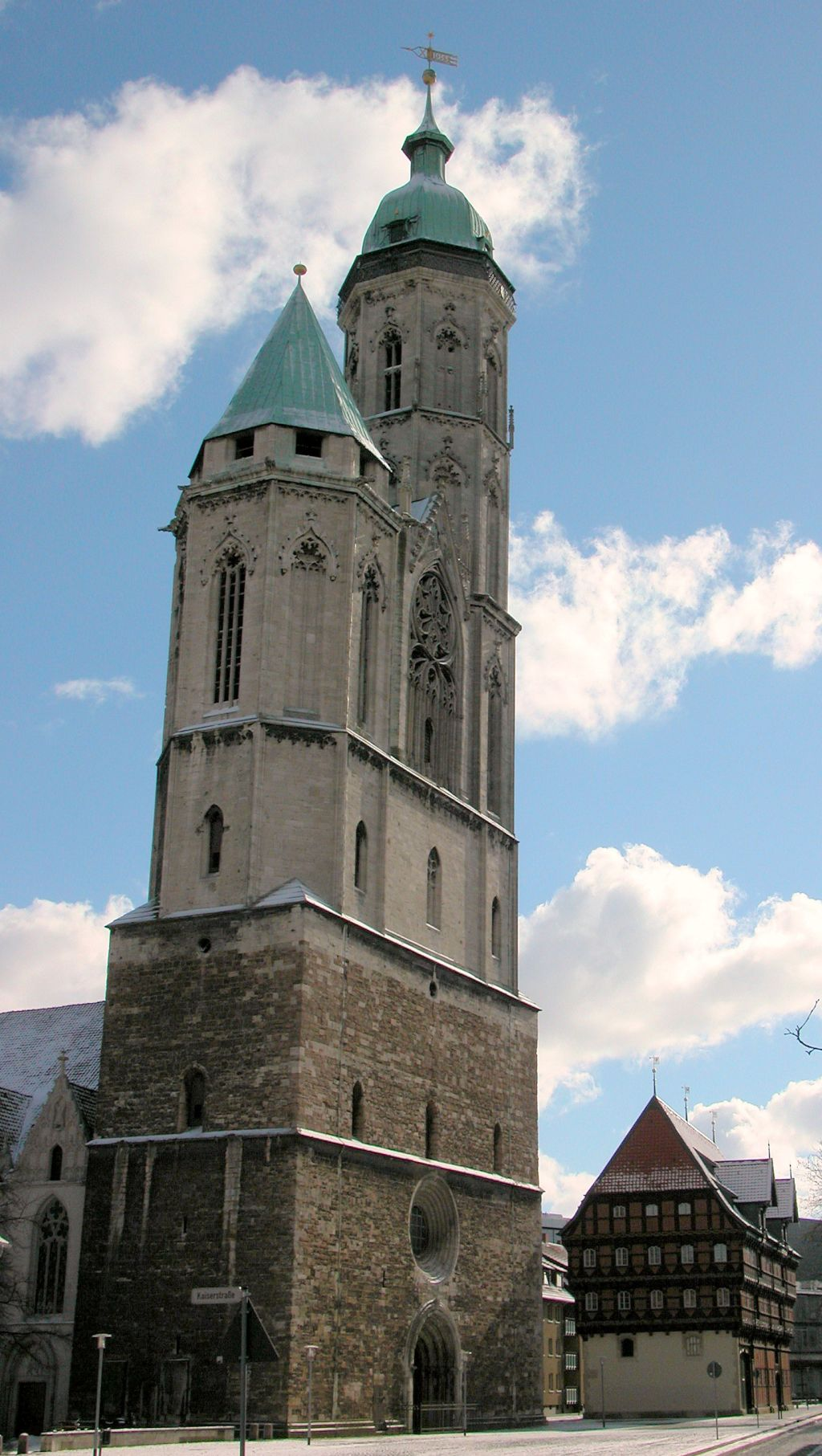 Braunschweig: Andreaskirche mit der Alten Waage